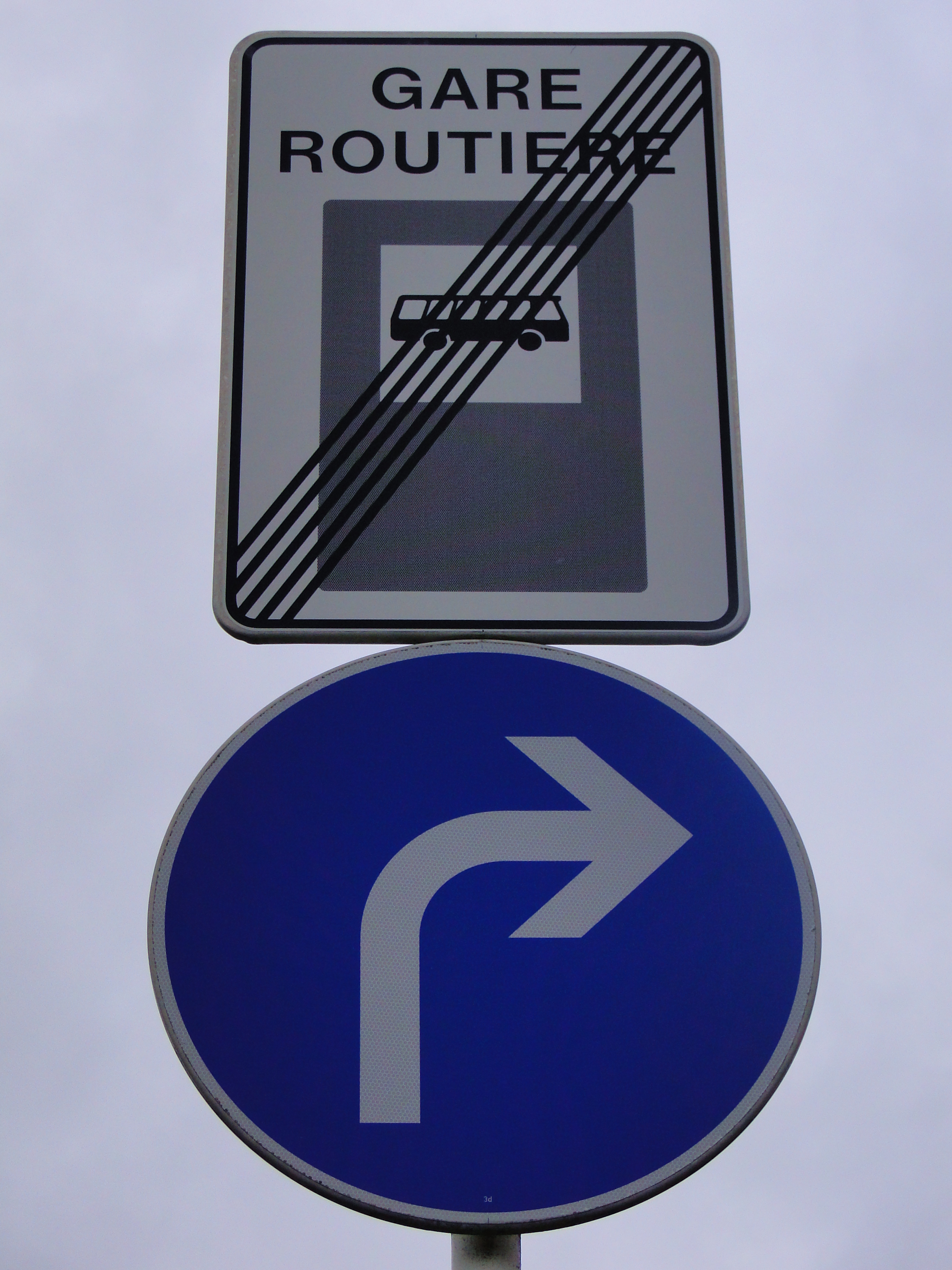 Verkéiersschëld H,4a "Fin de la gare routière" aus dem lëtzebuerger Code de la Route; hei zesumme mam Schëld D,1a